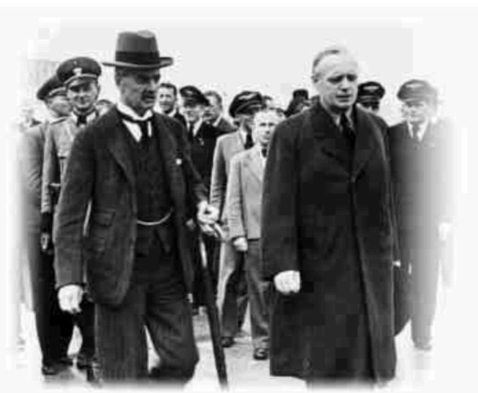 Невиль Чемберлен в аэропорту Мюнхена с министром иностранных дел рейха Йоахимом фон Риббентропом. Сентябрь 1938-го.